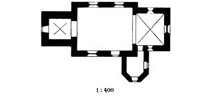 Grundriss der St. Johanneskirche in Sundern